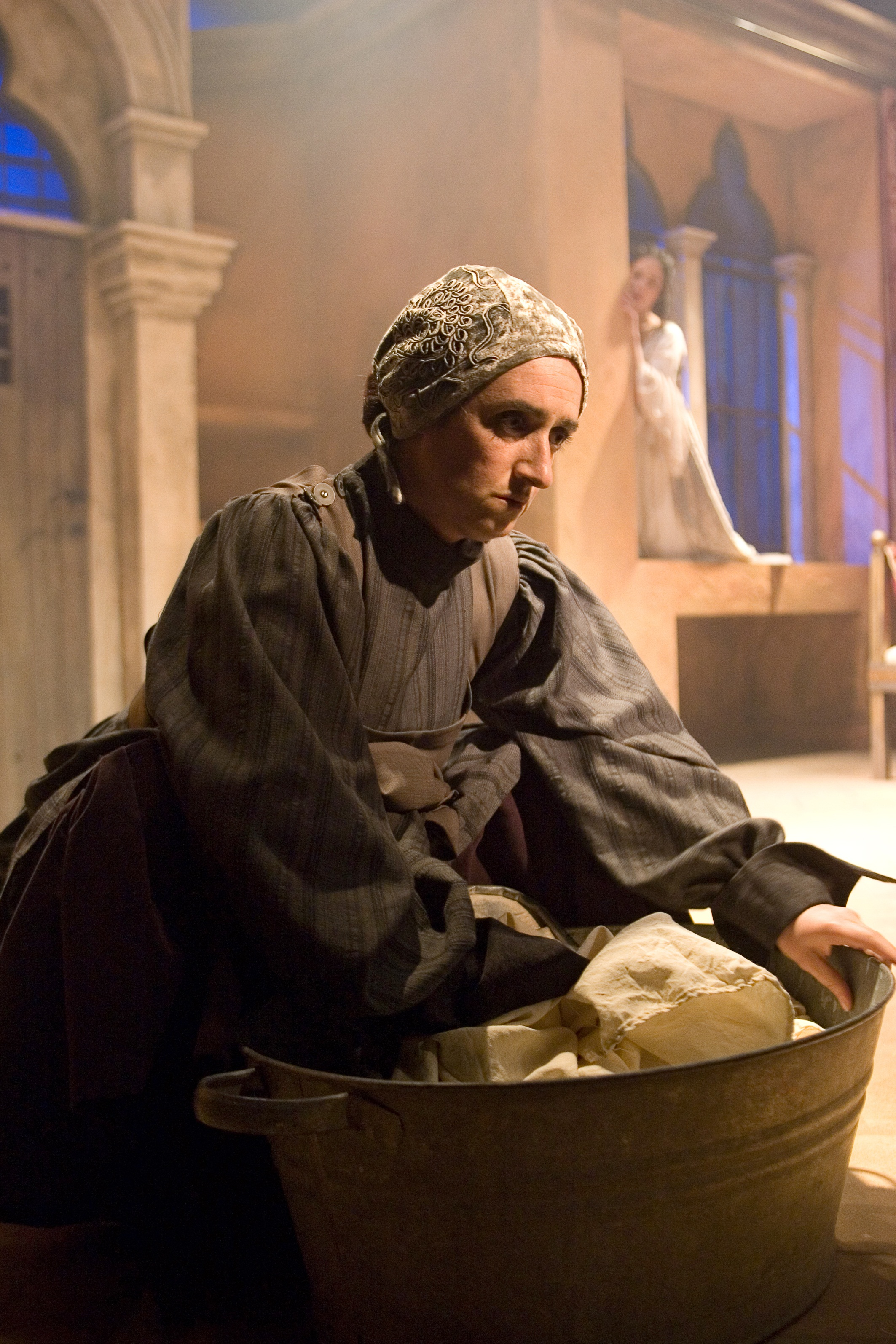 ההצגה "שלוש נשים מחכות", בבימויה של מור פרנק, תיאטרון החאן